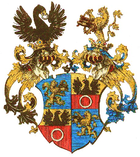 Gebessertes Wappen der Oelhafen (von Schöllenbach): Als sich 1501 der Nördlinger Patriziersohn Sixtus Oelhafen in Nürnberg mit Anna Pfinzing von Henfenfeld verehelichte, wurde das Wappen der Oelhafen gebessert. Der Schild wurde gevierteilt und in die Felder 2 und 3 das Wappen der Pfinzing, ein schwarzer Adler in Gold über einem silbernen Ring in Rot, eingearbeitet. Sixtus liess sich nunmehr in Nürnberg nieder, wo die Oelhafen sich versippten und bald den anderen ratsfähigen Geschlechtern gleich geachtet wurden. Auf dem Reichstag zu Worms 1521 bestätigte der Kaiser Karl V. außer den Schirm- und Wappenbriefen alle Privilegien und Freiheiten, "womit die Oelhafen bisher begabt und begnadet worden". Im Jahre 1512 bereits hatte die Familie von den Rechen von Rechenberg das Gut Schöllenbach (Ober- und Unterschöllenbach in der Gemeinde Eckental) erworben, das sie zu ihrem Familienstammsitz machten. Danach nannte sich nunmehr jedes Familienmitglied "Oelhafen von Schöllenbach". [1]